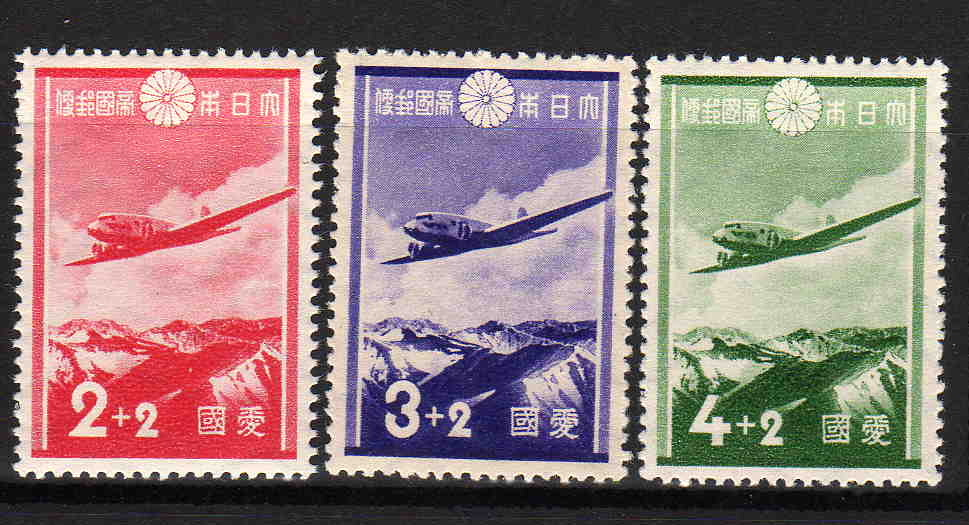 1937年に日本国内の飛行場整備の為の寄附金集めに発行された寄附金付切手。描かれているのは日本アルプス上空を飛行するダグラスDC-2である。